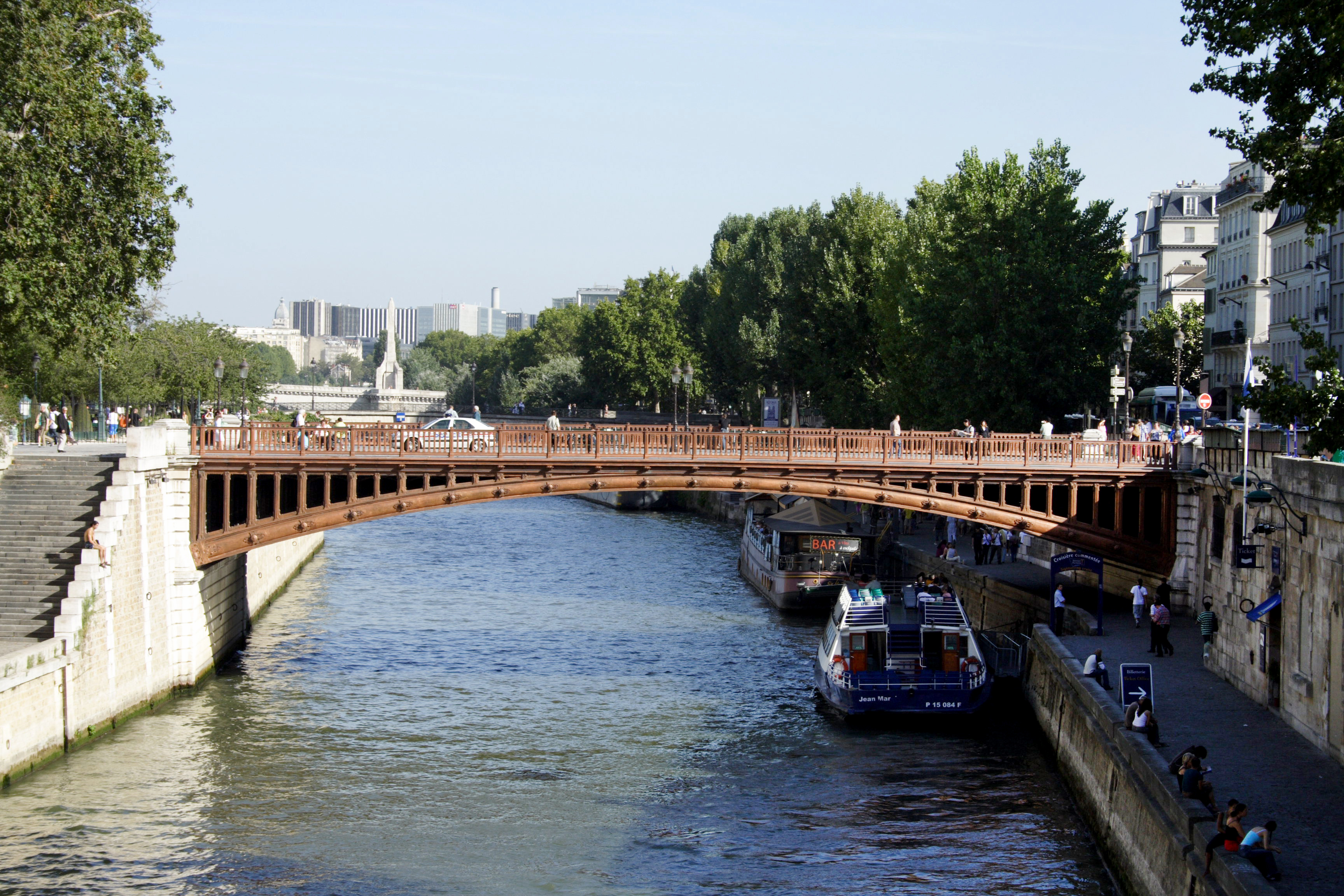 Pont au Double(Paris, France)